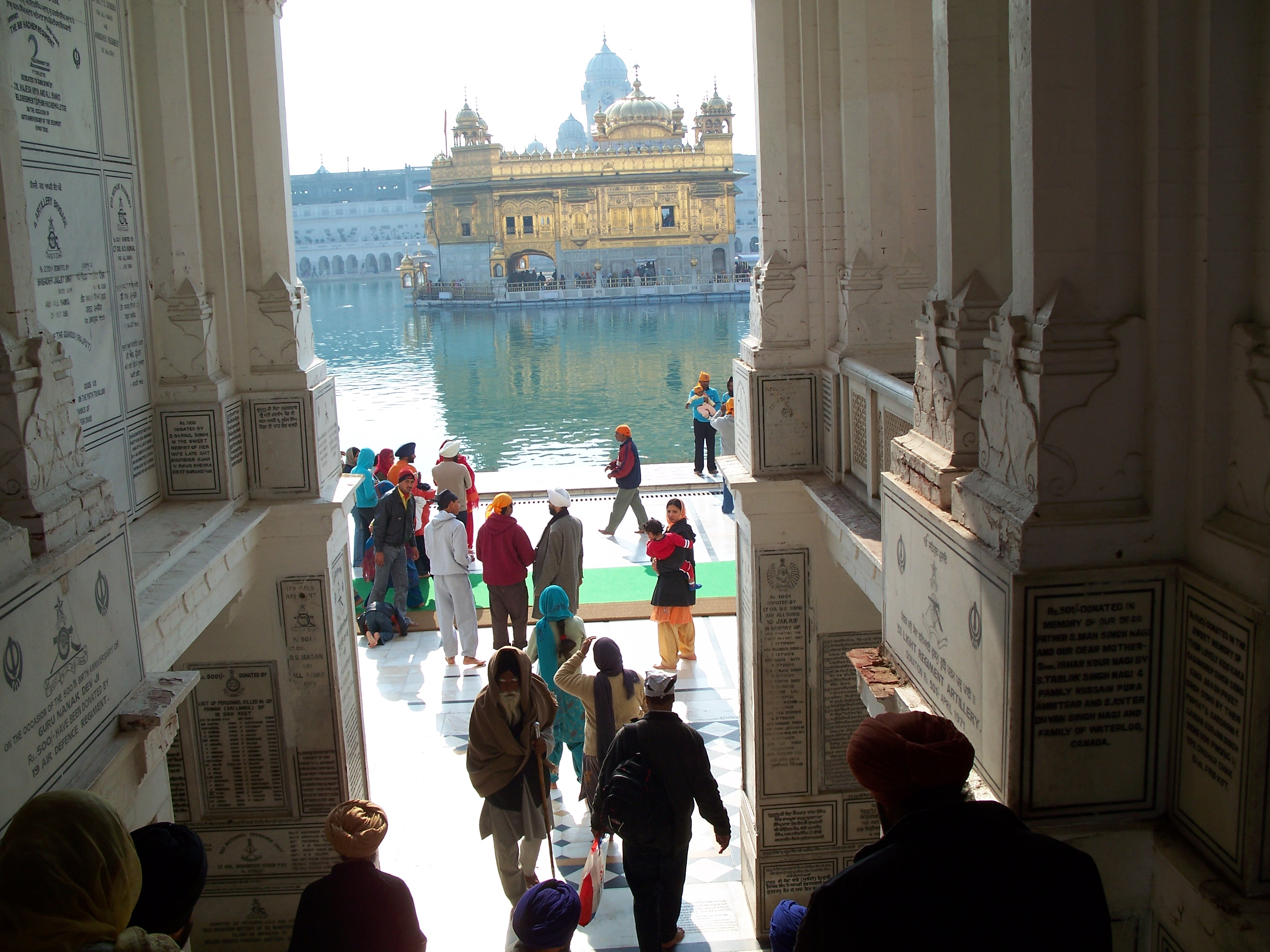 Golden Temple